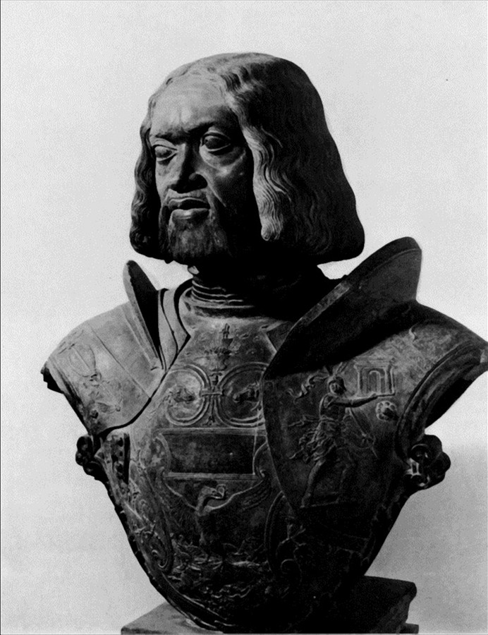 Busto in terracotta di Francesco II Gonzaga